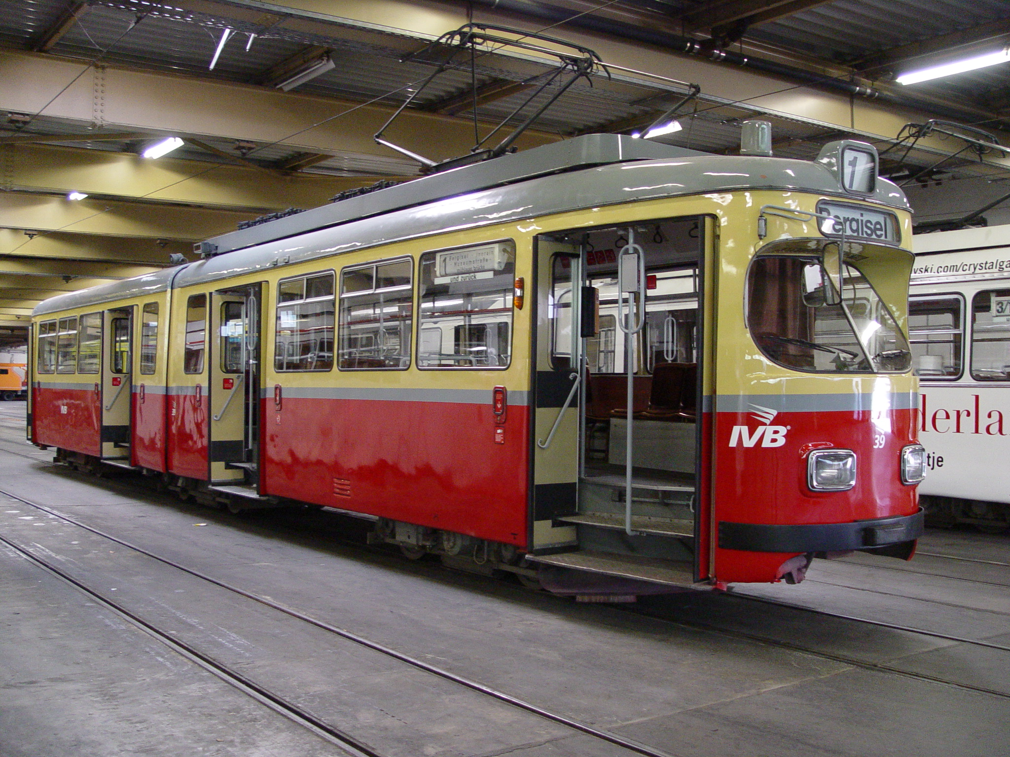 ex-Bielefelder Triebwabwagen 39 der Straßenbahn Innsbruck